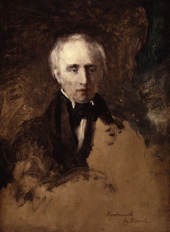 William Wordsworth, oil on panel, 1831